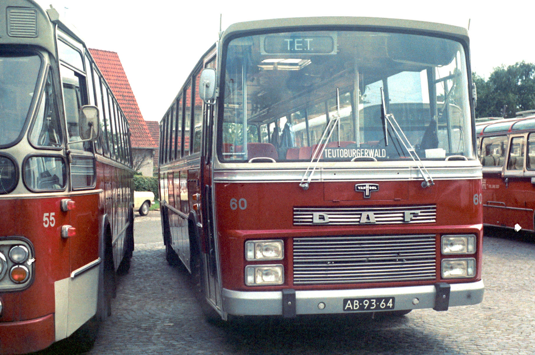 Twentsche Electrische Tramweg Maatschappij bus 60 Van Hool / DAF type TB160DS605.